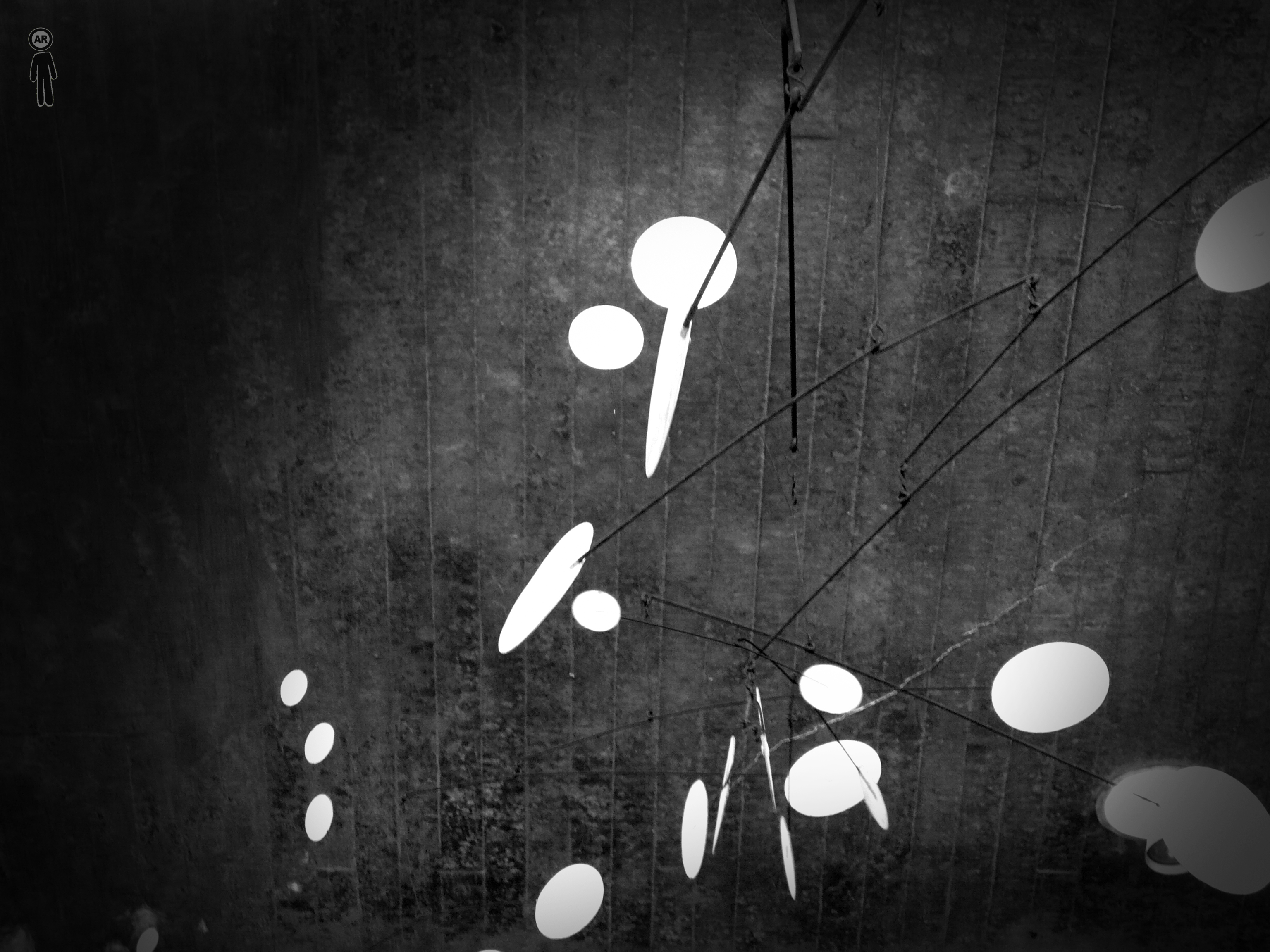 Título: Ráfaga de Nieve. Autor: Alexander Calder. Año: 1953 Ubicación: Facultad de Arquitectura.Descripción: Escultura Cinética. Estructuras móviles en hierro bicromado.